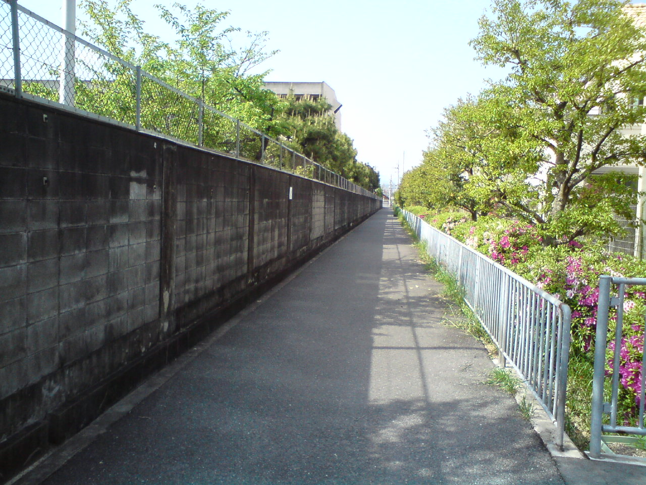 三島高等学校